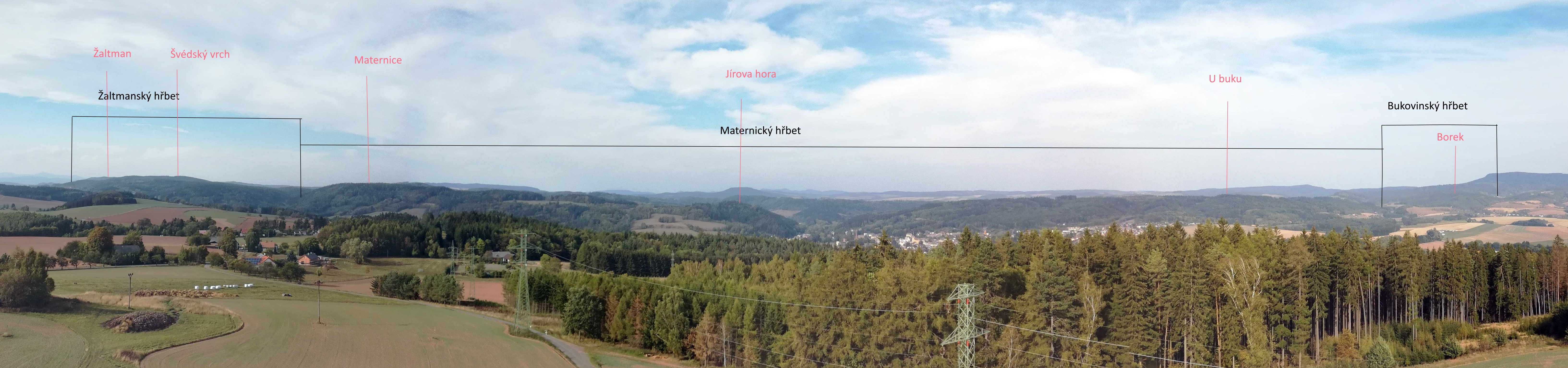 Panorama Jestřebích hor ze Signálu v Červenokostelecké pahorkatině s vyznačením jejich tří podokrsků.